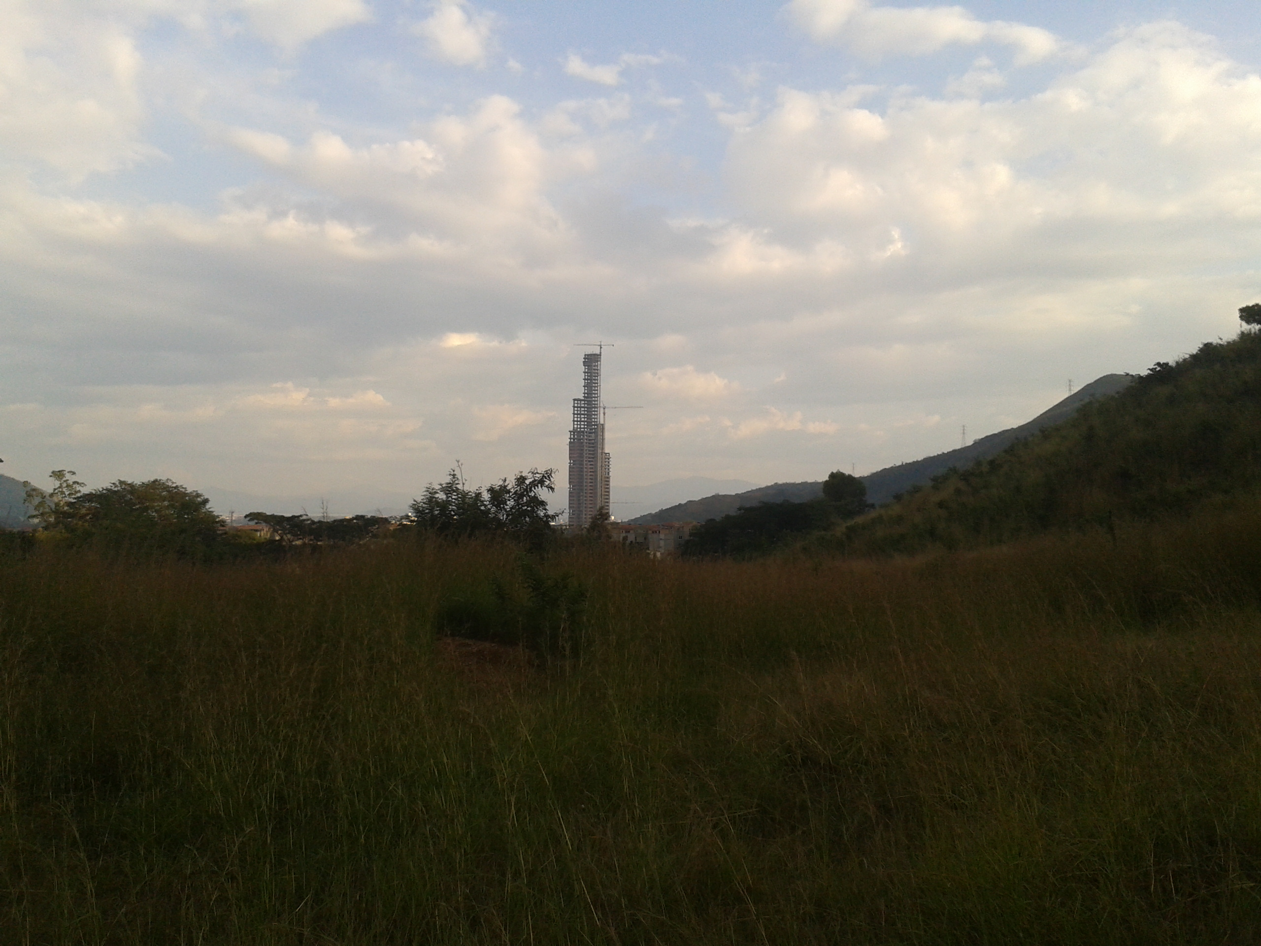 san diego